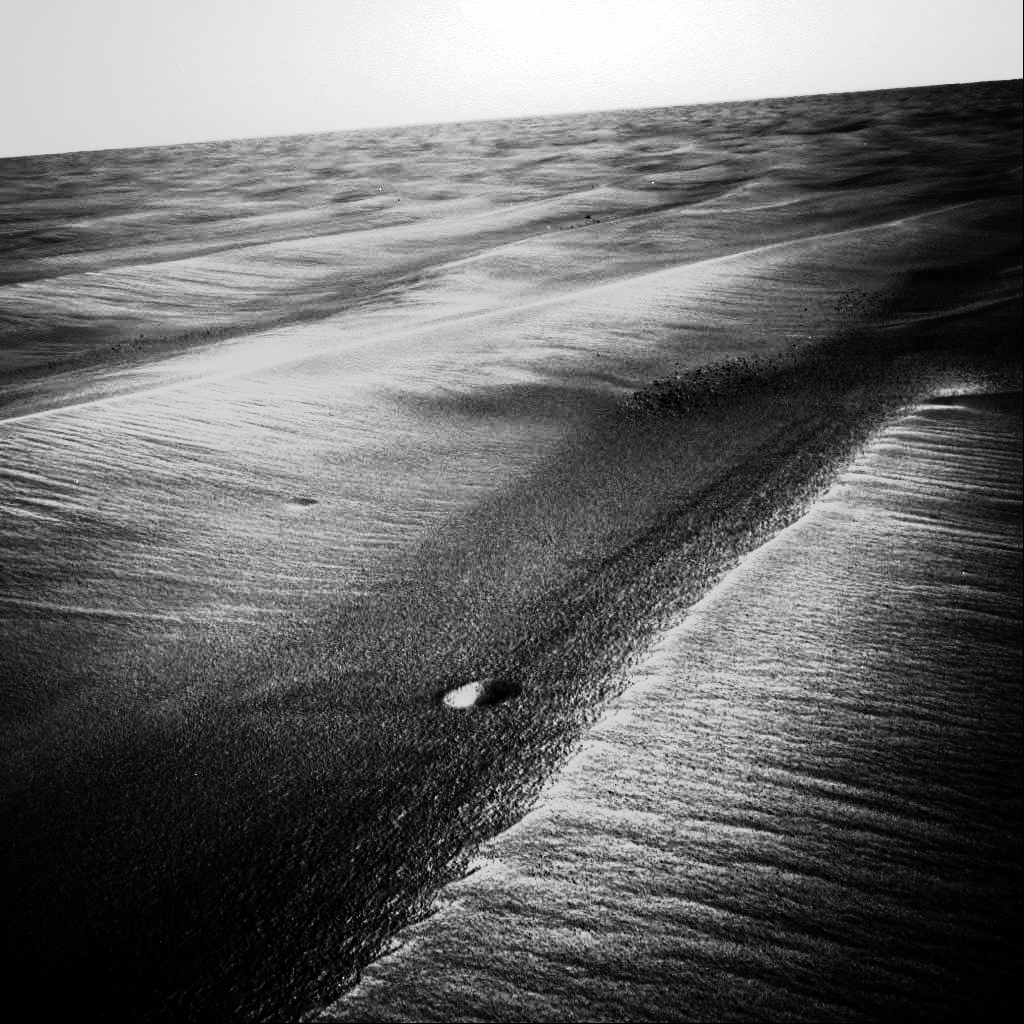 Dieses Bild basiert auf dem Bild 113766main 04272005 tinyCrators.jpg, welches gemeinfrei („public domain“) ist. Der Urheber des Bildes 113766main 04272005 tinyCrators.jpg ist die NASA.